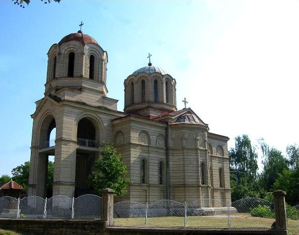 Serbian Orthodox Church in Lebane, Serbia/L'église orthodoxe serbe de Lebane, Serbie